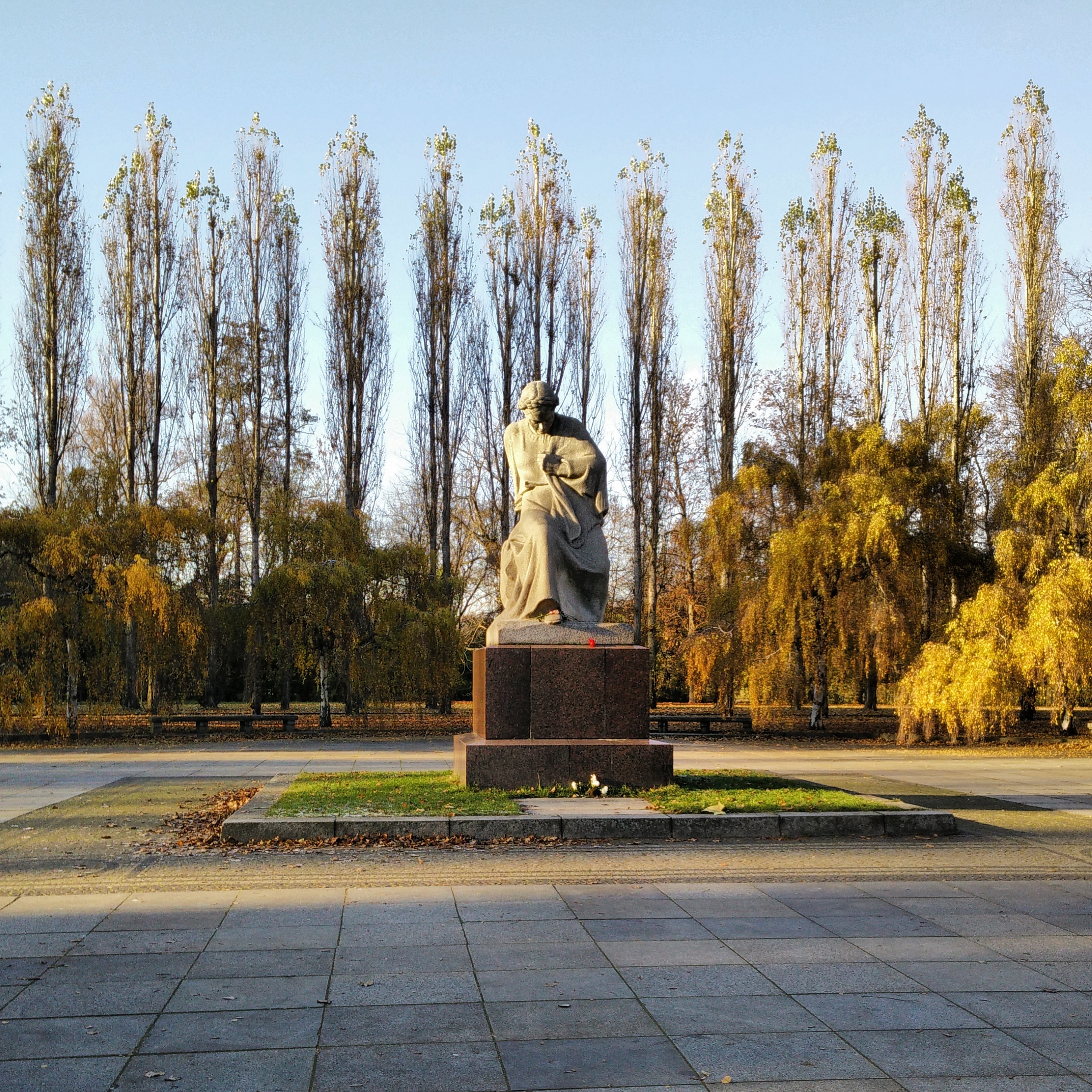 Mutter Heimat, Sowjetisches Ehrenmal im Treptower Park.